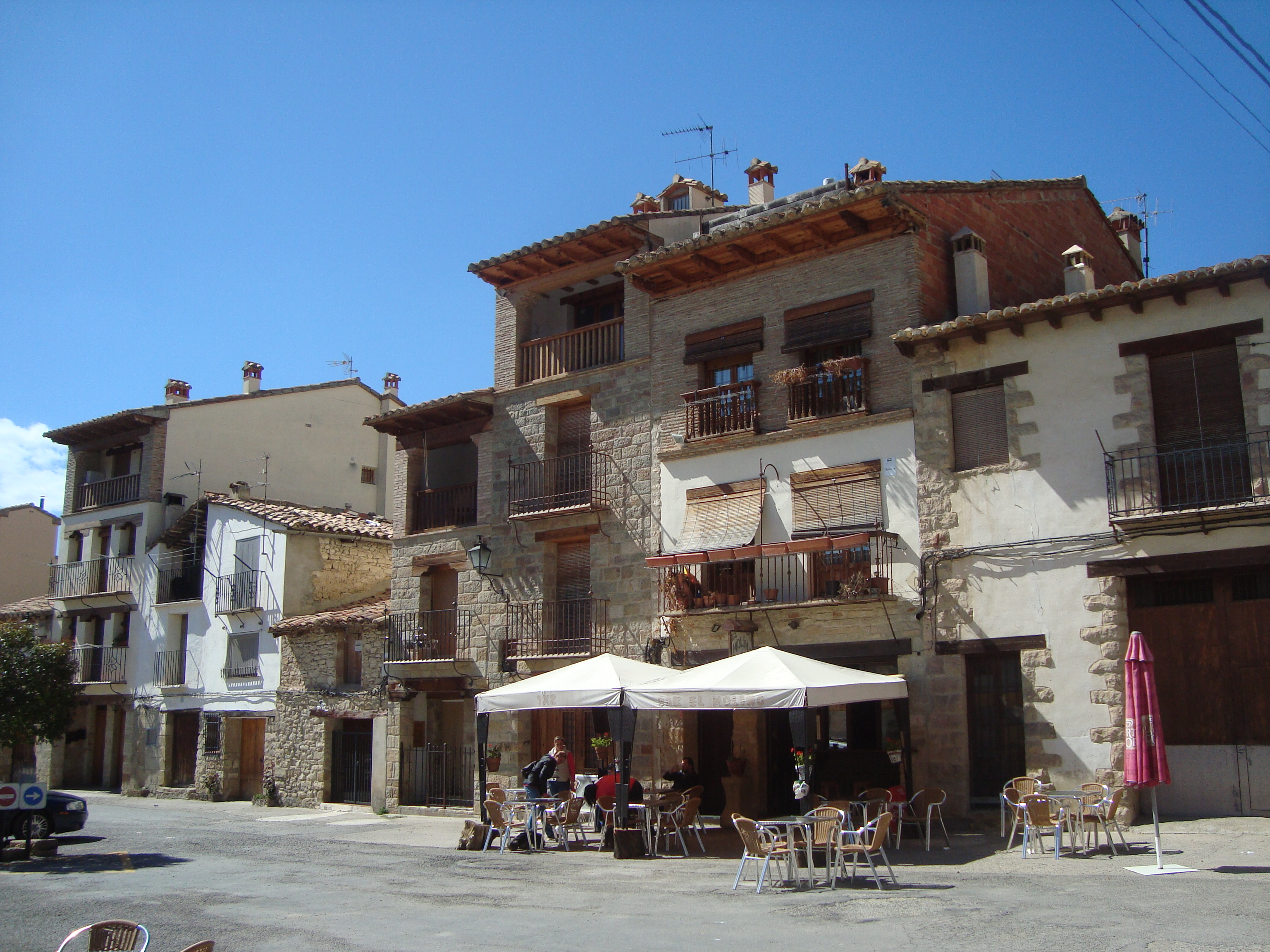 Plaza del Carmen (Rubielos de Mora)